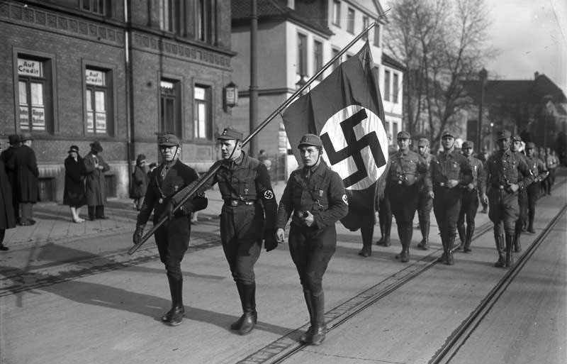 Zu dem Verbot der S.A. der "Privat Armee" Adolf Hitlers! Sturmtrupps der verbotenen S.A. beim Marsch durch die Strassen Braunschweigs.